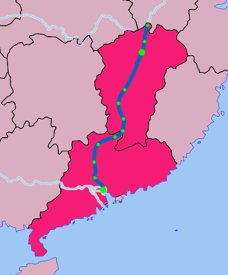 贛語: 赣粤运河